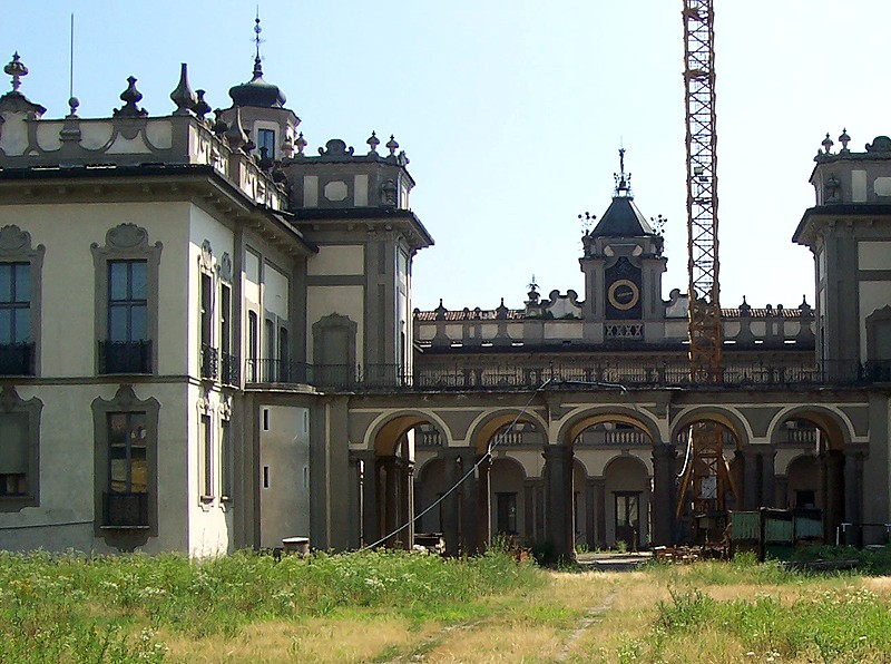 Brignano Gera d'Adda - Palazzo Visconti